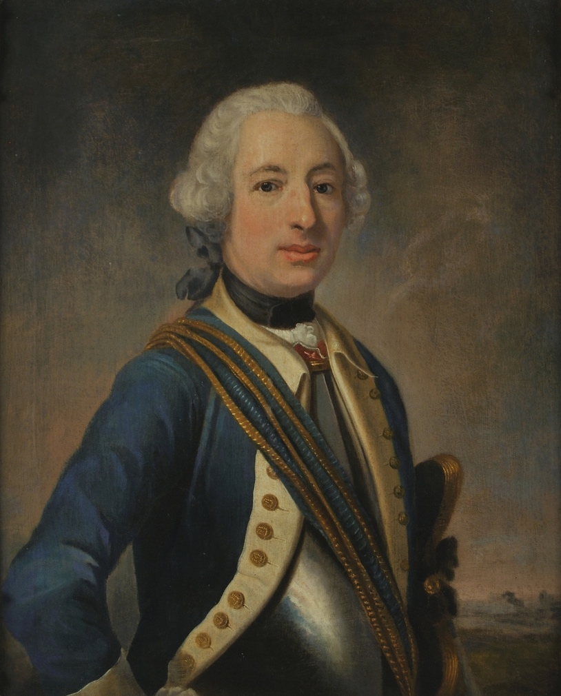 Porträtt av Carl Vilhelm Åkerhielm af Blombacka (1735-1806) iklädd uniform för Västgöta kavalleriregemente. Han bär harnesk under rocken, och håller en tricorn under armen. Målning av okänd konstnär från ca 1760.